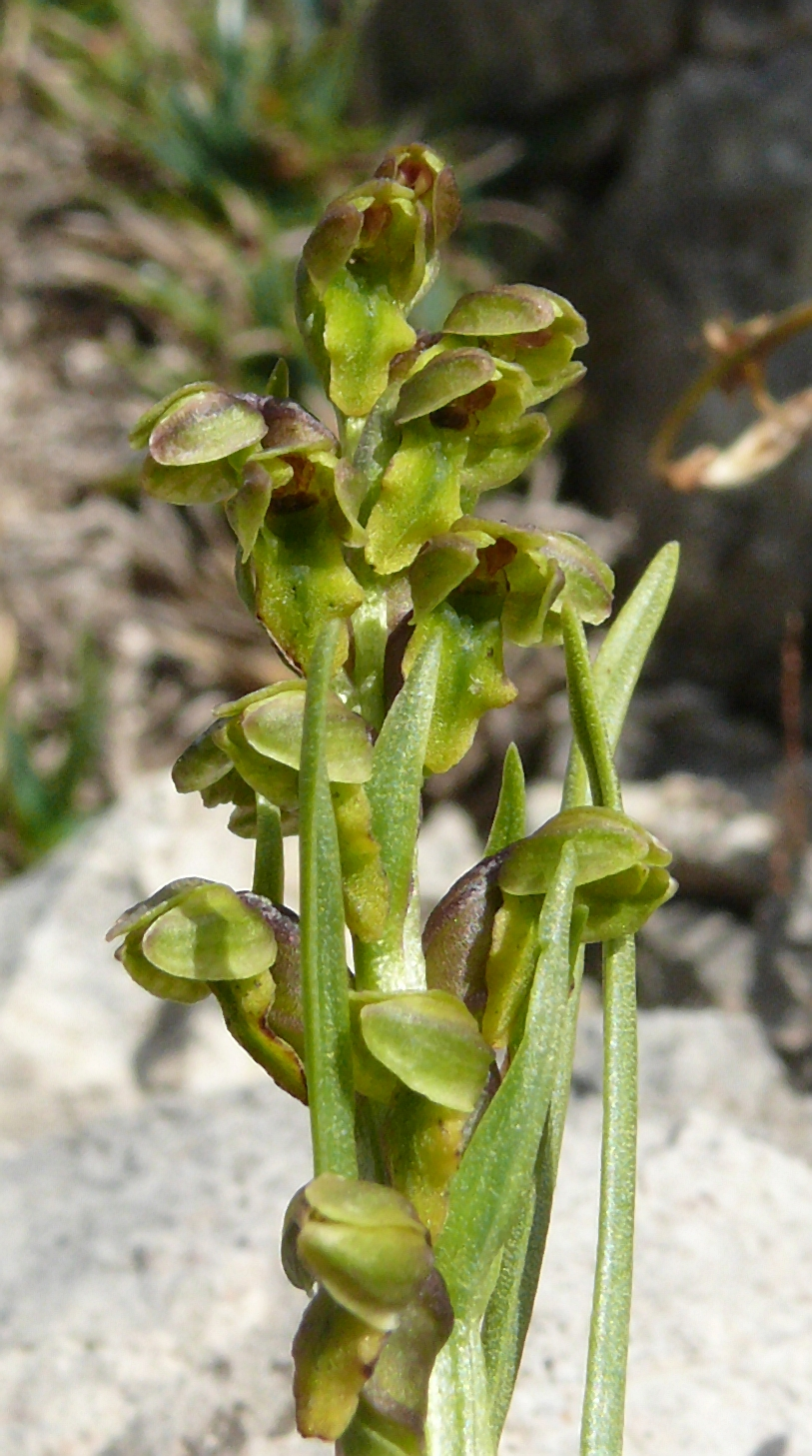 Chamorchis alpina, Allgäuer Alpen, Österreich